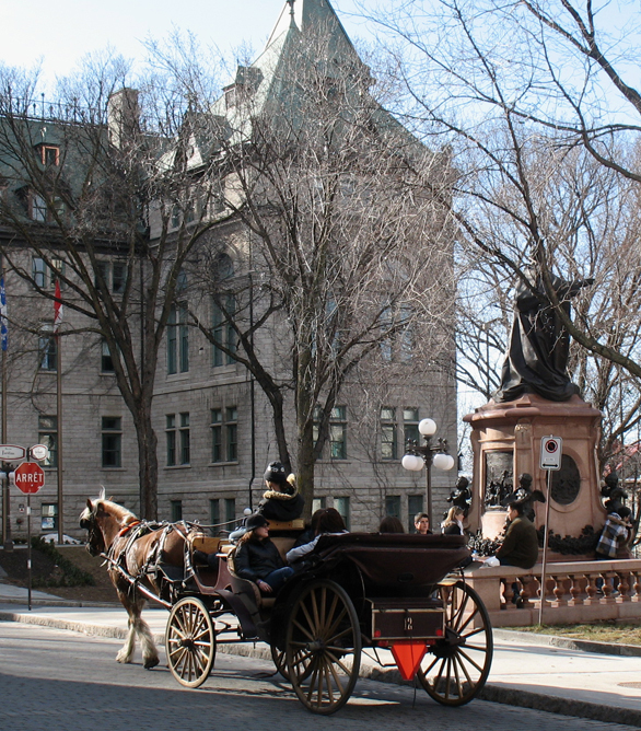 Rue De Buade, ville de Québec, Québec, Canada. Elle est située dans le quartier latin entre l'hôtel de ville de Québec et la basilique-cathédrale Notre-Dame de Québec.